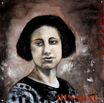 Portret van Johanna Slagter-Dingsdag (1985) door Gerda Roodenburg-Slagter. Een van de 21 portretten die in opdracht van de Universiteit van Amsterdam werden gemaakt door het Vrouwen Kunst Kollektief.